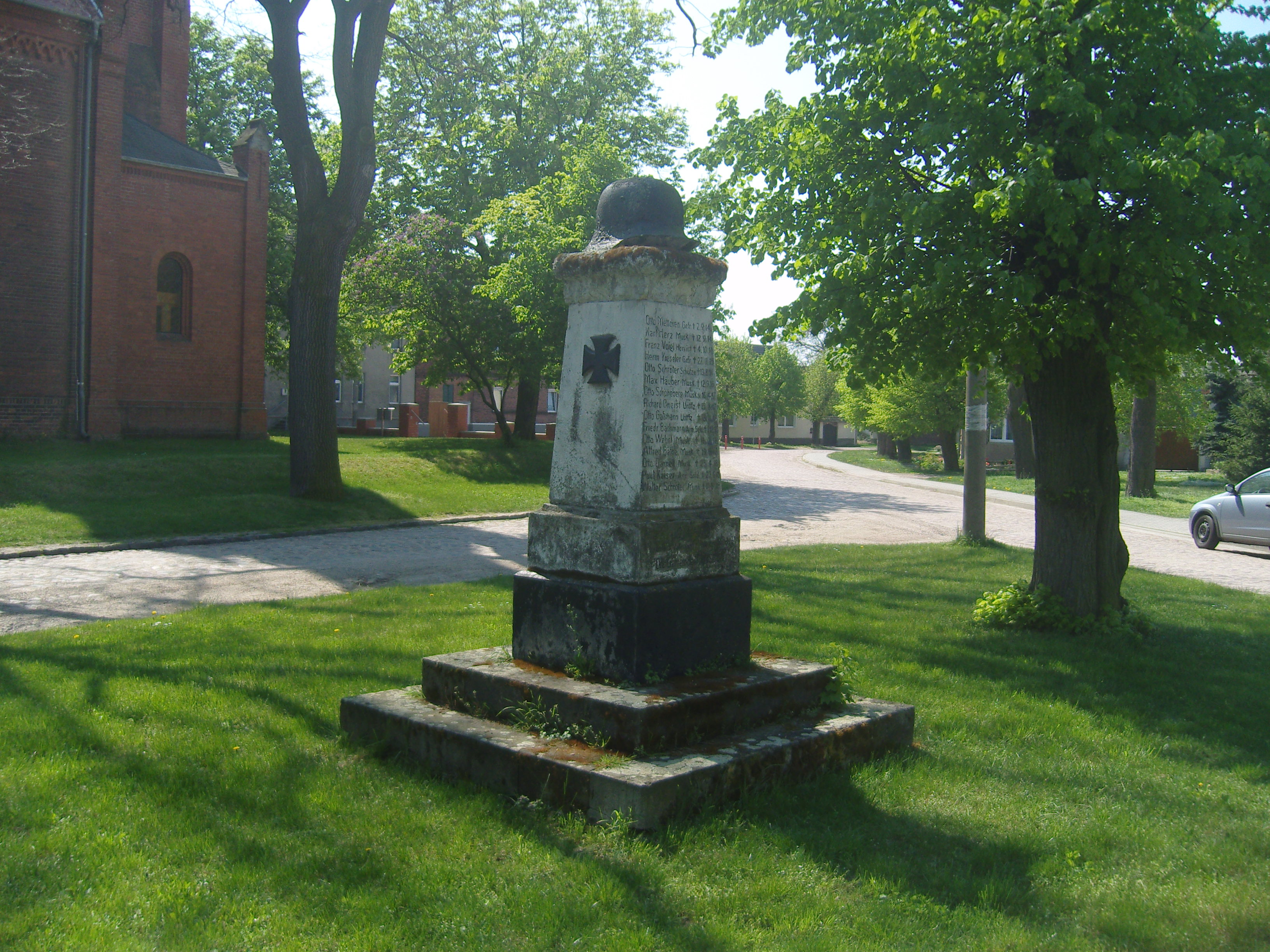 Kriegerdenkmal für die Gefallenen des Ersten Weltkrieges in Hinsdorf